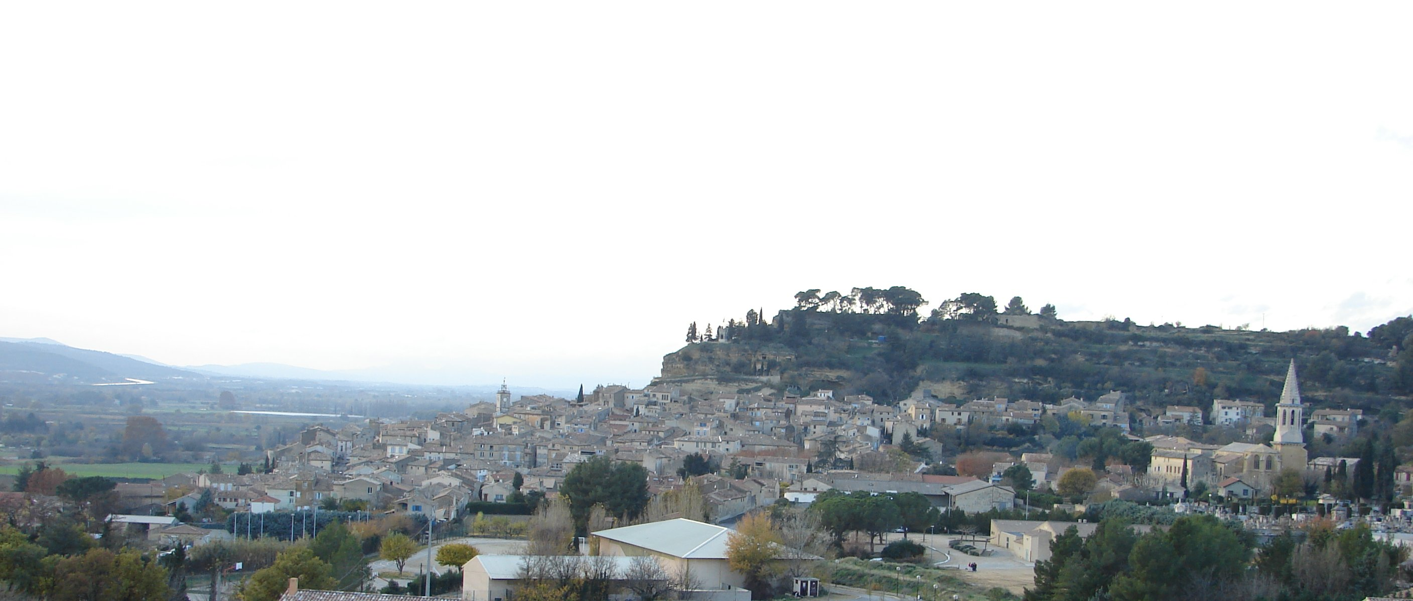 La commune de Cadenet vue d'est. Cadenet fotografiita el oriento.